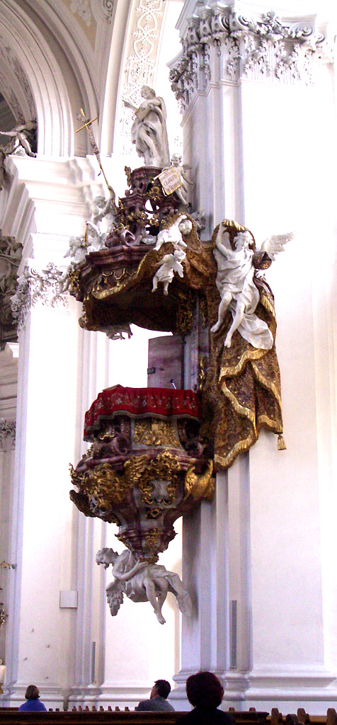 Weingarten, Germany: Basilika St. Martin, Pulpit by Fidel Sporer , 1762-1765